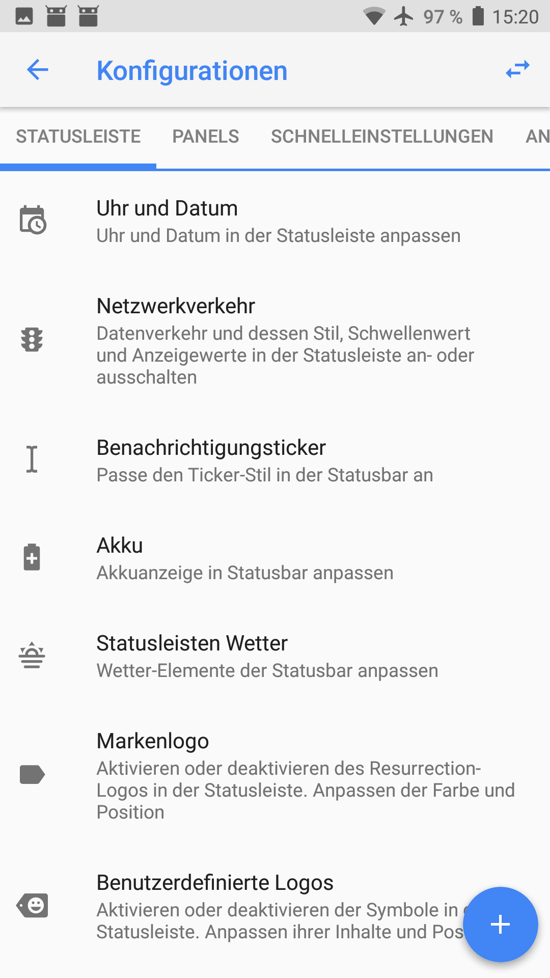 Screenshot Einstellungen Resurrection Remix